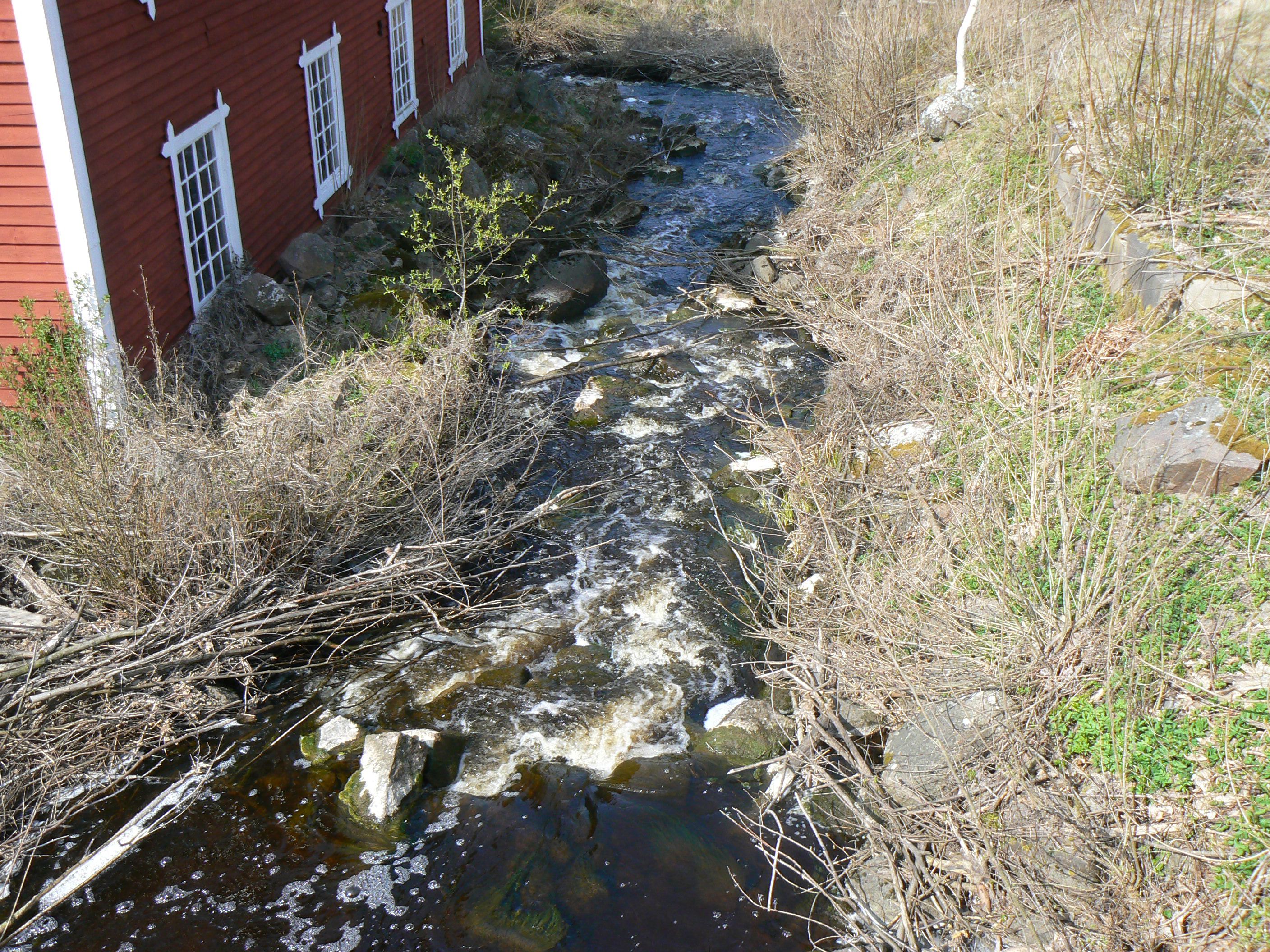 Humpån river, Östergötland, Sweden.